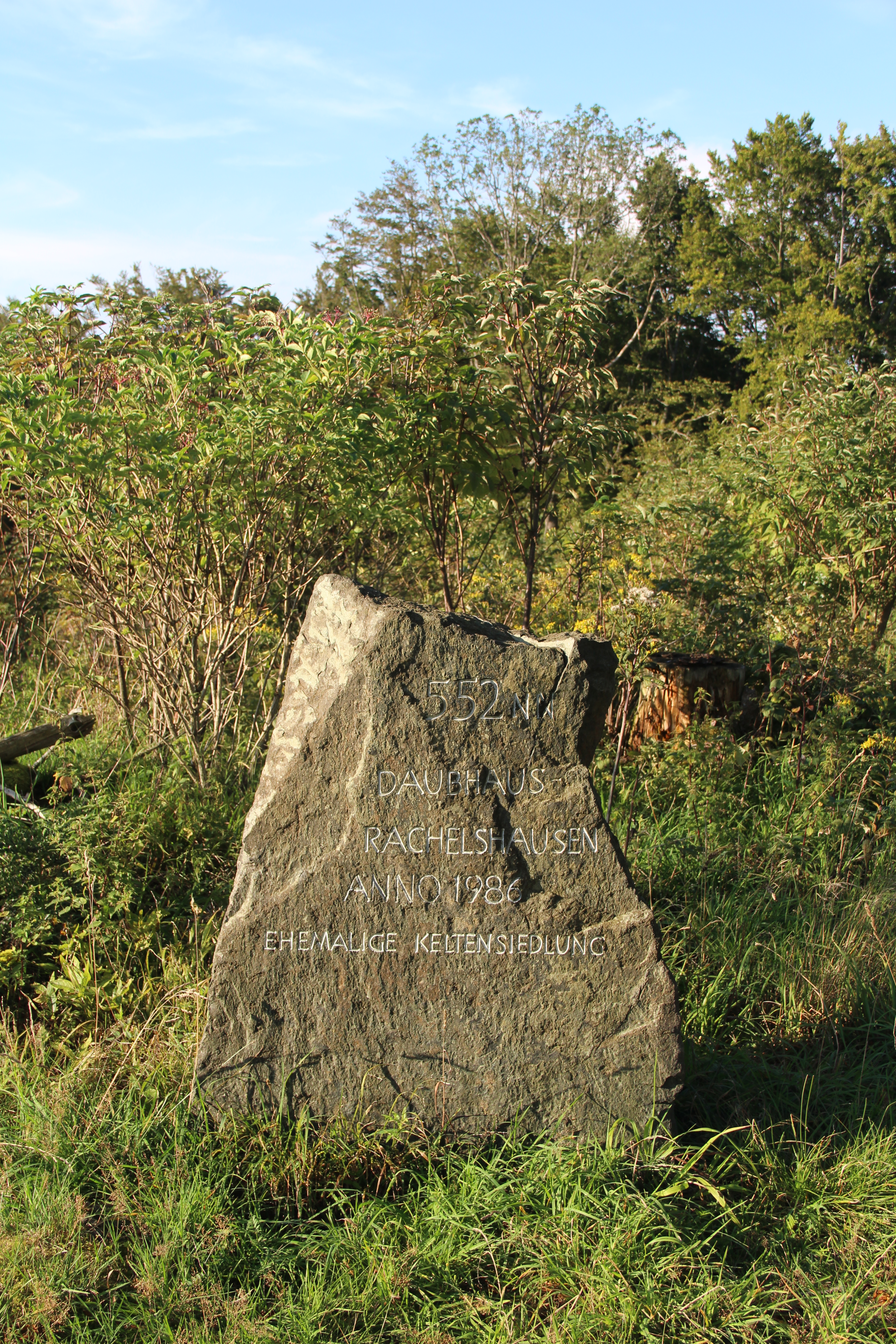 Daubhaus